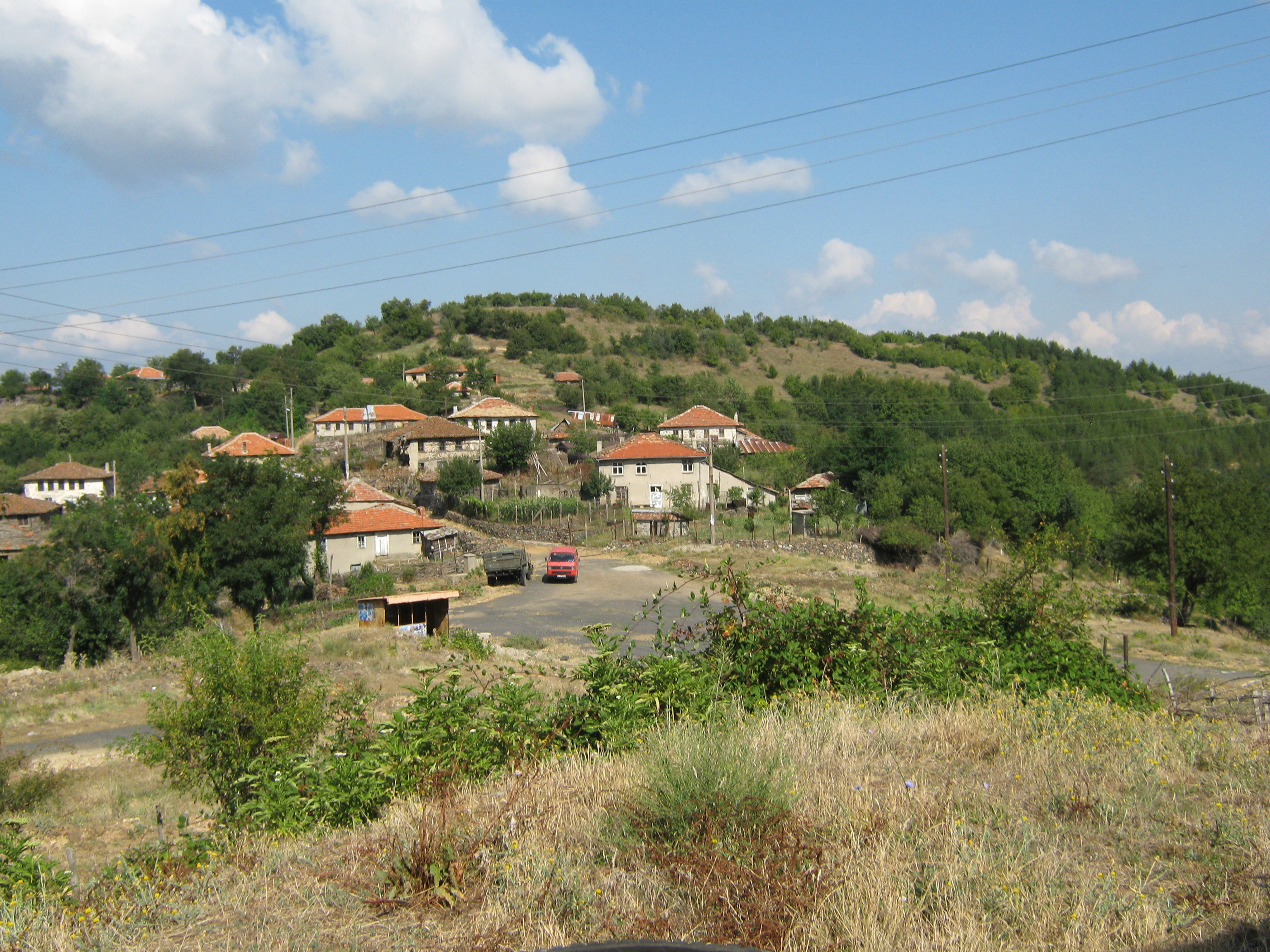 село Сенце